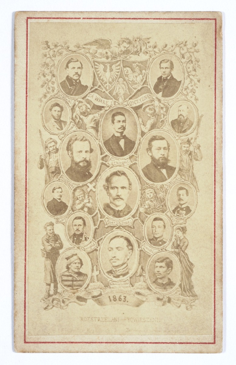 Za Wiarę i Ojczyznę 1863 rozstrzelani - powieszeni. Arnhold, Jan (1841-1862) Chmieleński, Zygmunt (1835-1863) Frankowski, Leon (1843-1863) Jankowski, Józef (1833-1864) Kołyszko, Bolesław (1837 lub 1838-1863) Kononowicz, Władysław (1820-1863) Krajewski, Rafał (1834-1864) Mackiewicz, Antoni (1827-1863) Padlewski, Zygmunt (1836-1863) Piotrowski, Józef (1839-1863) Sierakowski, Zygmunt (1827-1863) Śliwicki, Piotr (ca 1840-1862) Traugutt, Romuald (1826-1864) Zwierzdowski, Ludwik (1829-1864) Żuliński, Roman (1830-1864) Ozdobne obramienie proj. Walerego Eliasza Radzikowskiego.